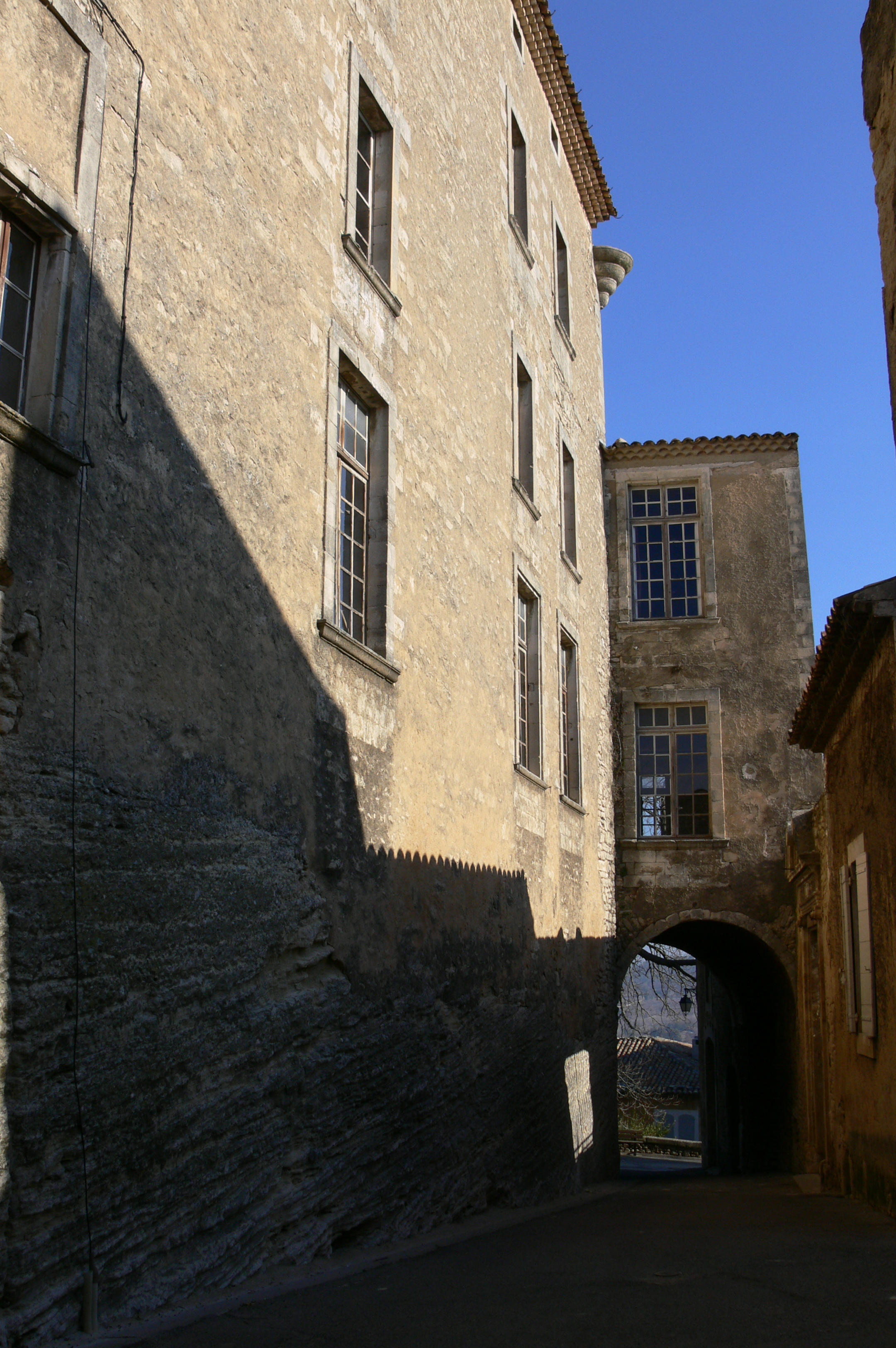 Rue du Chateau